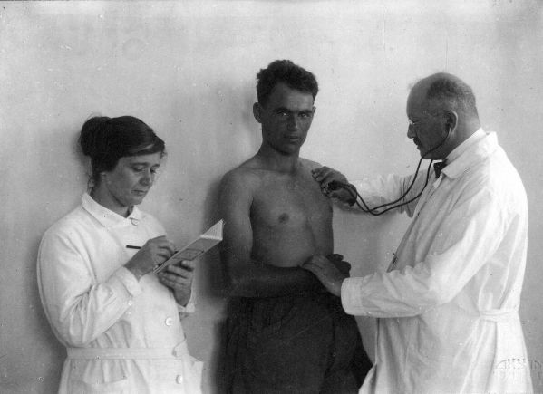 ד"ר אברהם רוזנטל ואחות בודקים מטופל ב"ארזה" בשנות ה-30